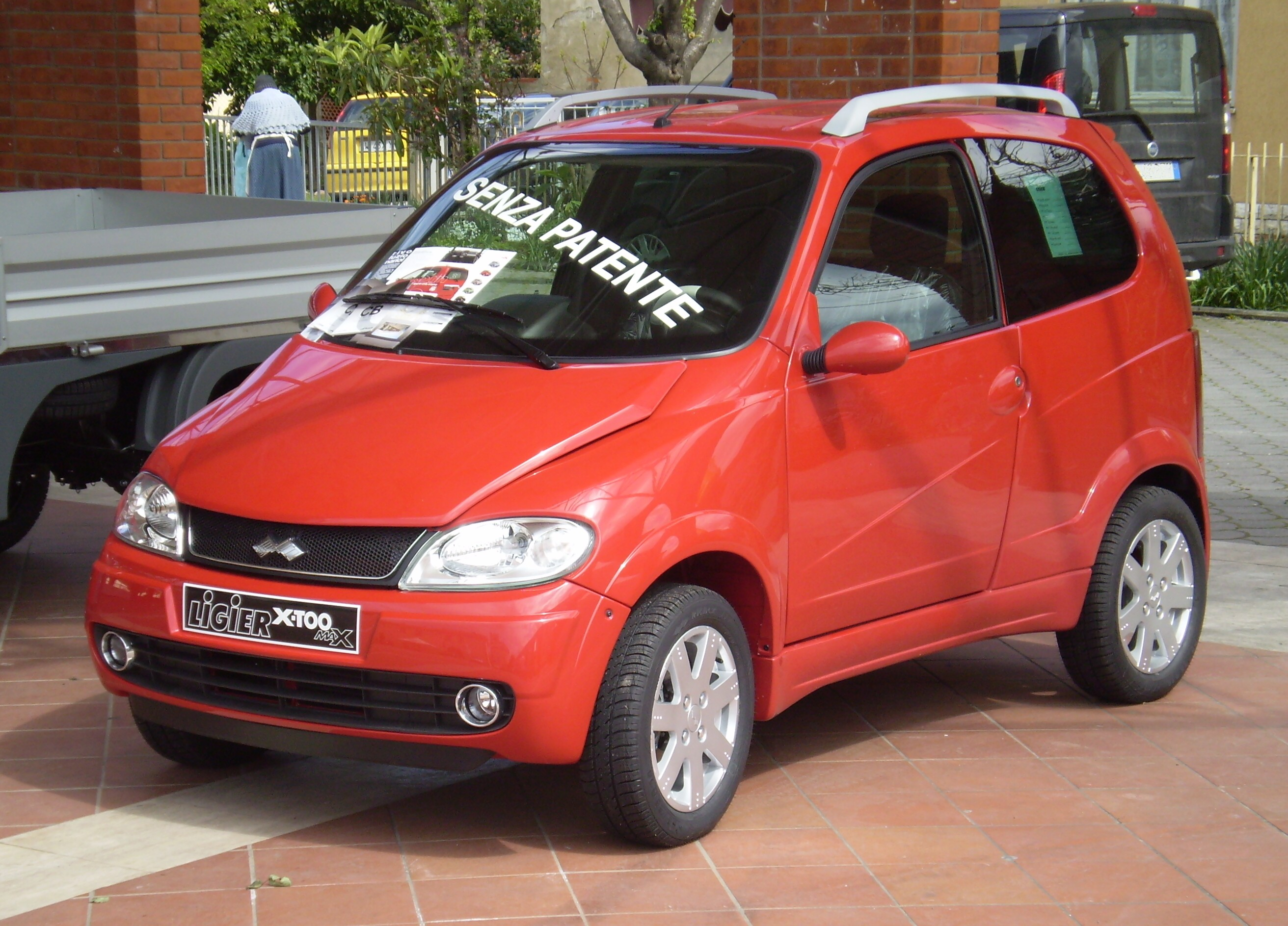 Ligier X-TOO